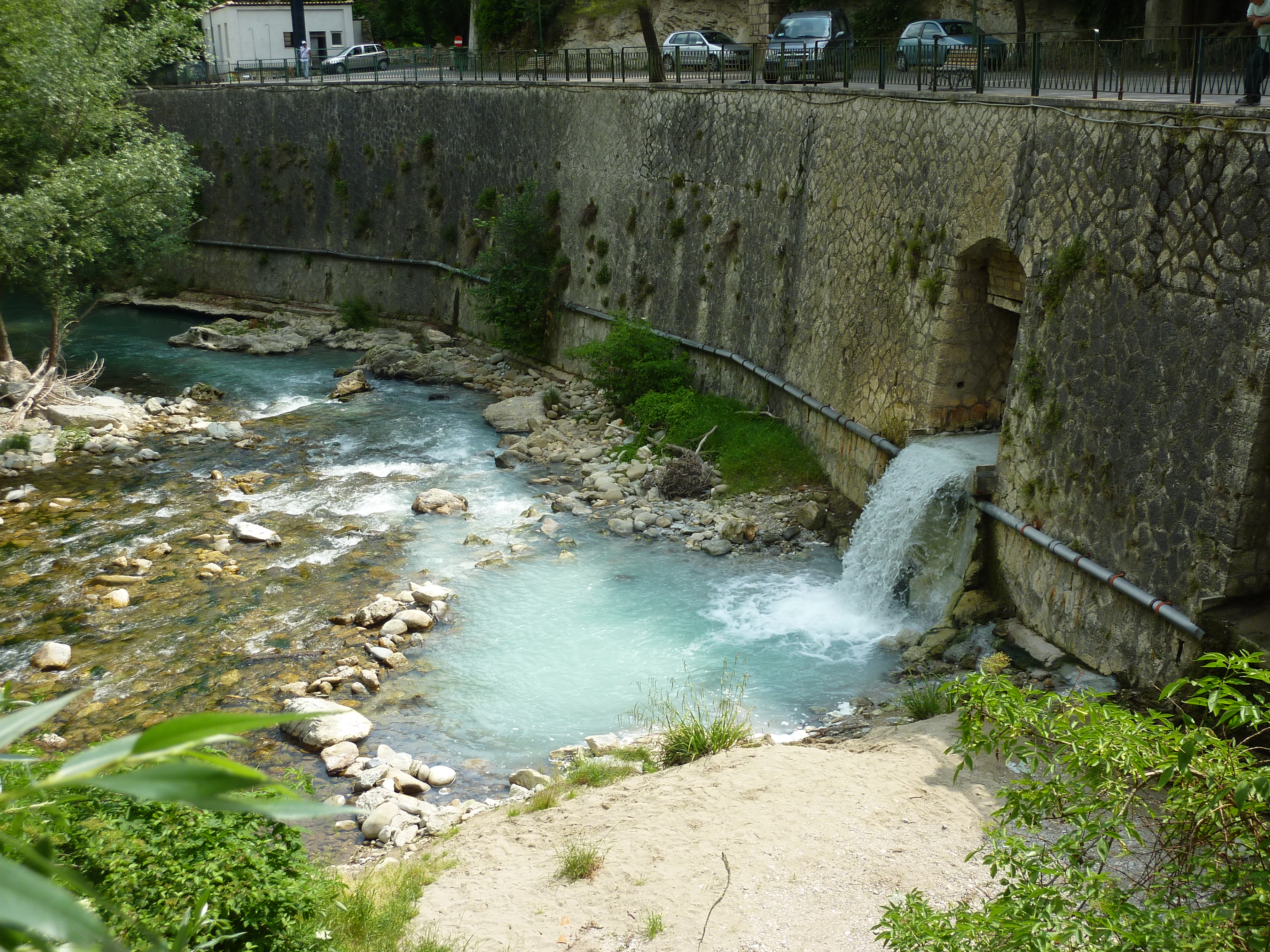 Acque sulfuree